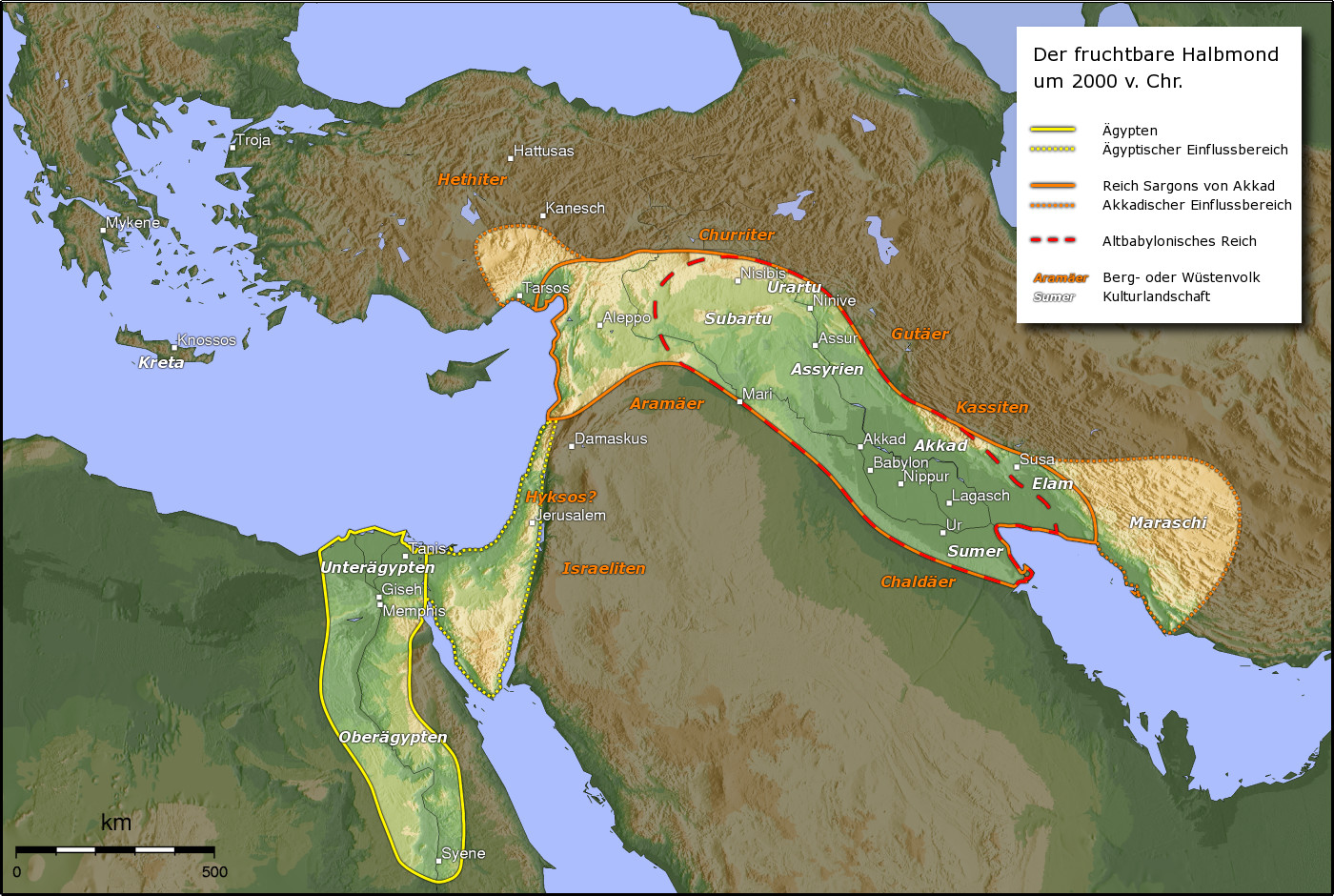 Alter Orient